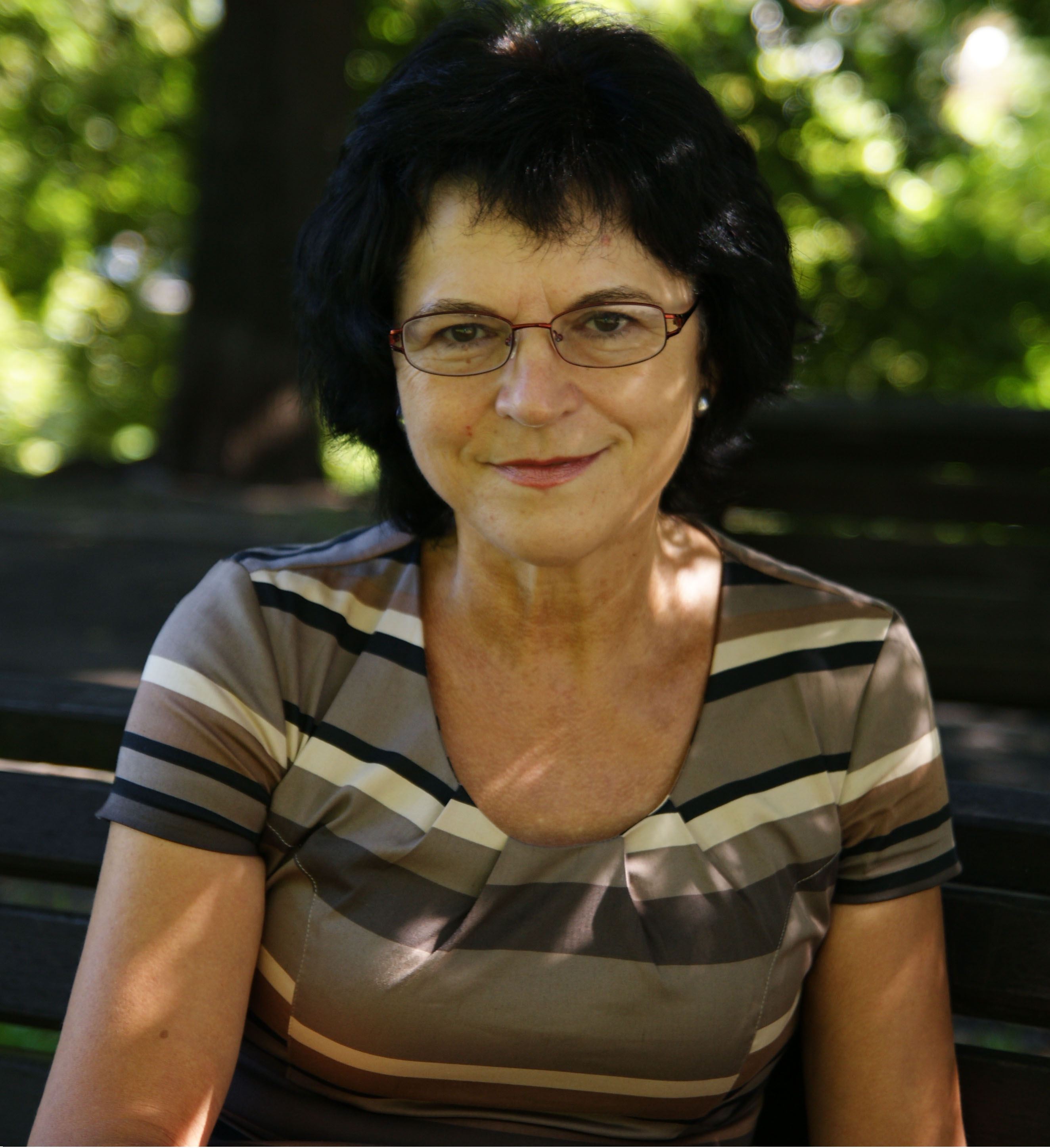 Ewa Ferenc